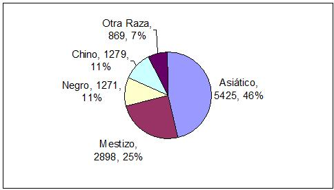 gráfico de tarta de las minorías (no blanco) en la población del condado de Shropshire, Inglaterra, inluso a la autoridad unitaria de Telford & Wrekin